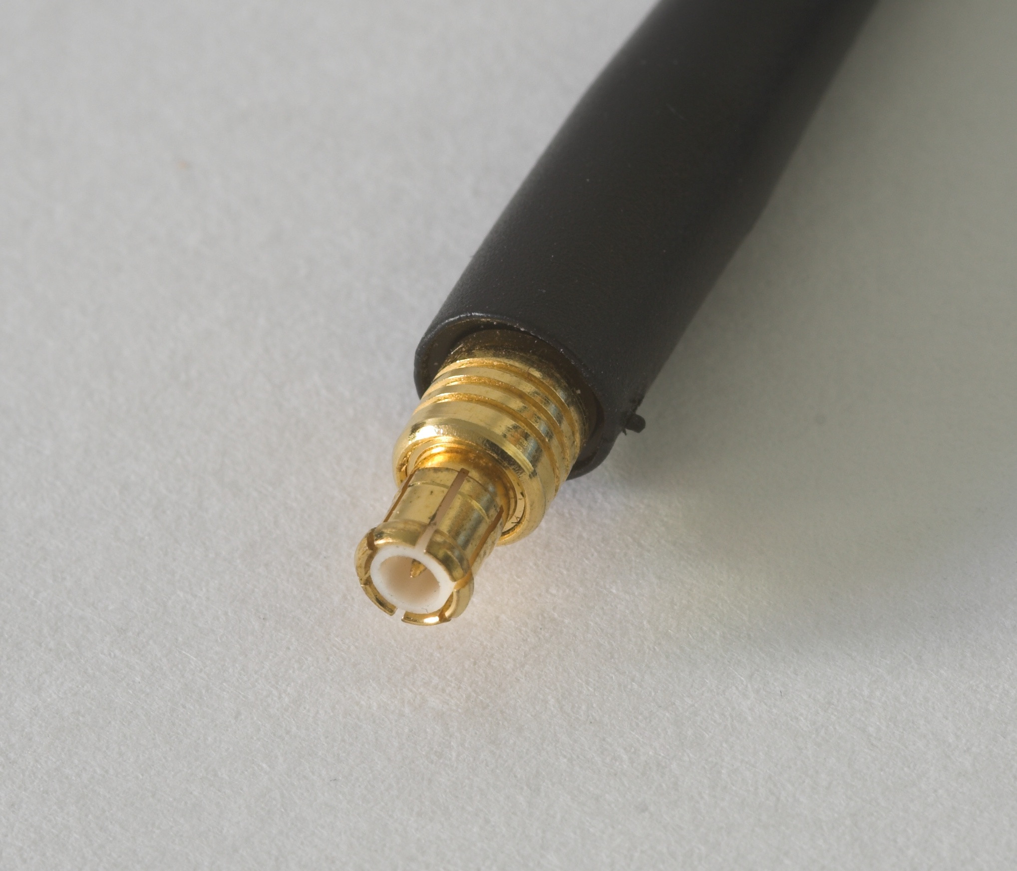 MCX Plug